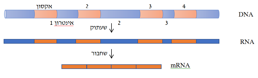 תיאור סכמתי של תהליך השחבור. הישר העליון מיצג את הDNA הגנומי המשועתק למולקולת mRNA. הישר התחתון מיצג את מולקולת הmRNA לאחר תהליך השחבור.